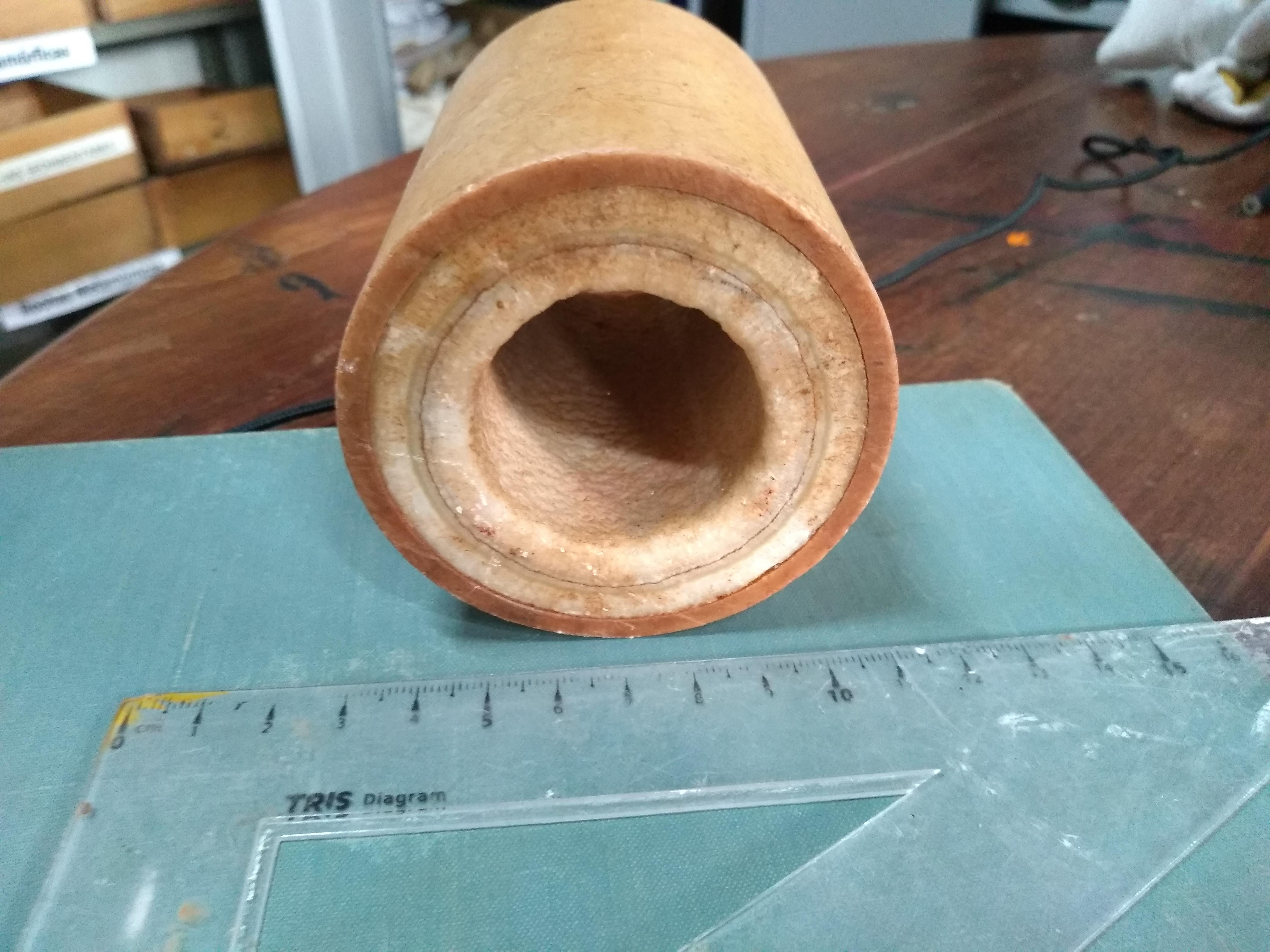 Incrustação salina em cano de irrigação. Acervo do PET-Solos, Departamento de Ciências Agrárias e Ambientais, Universidade Estadual de Santa Cruz, Ilhéus, BA, Brasil